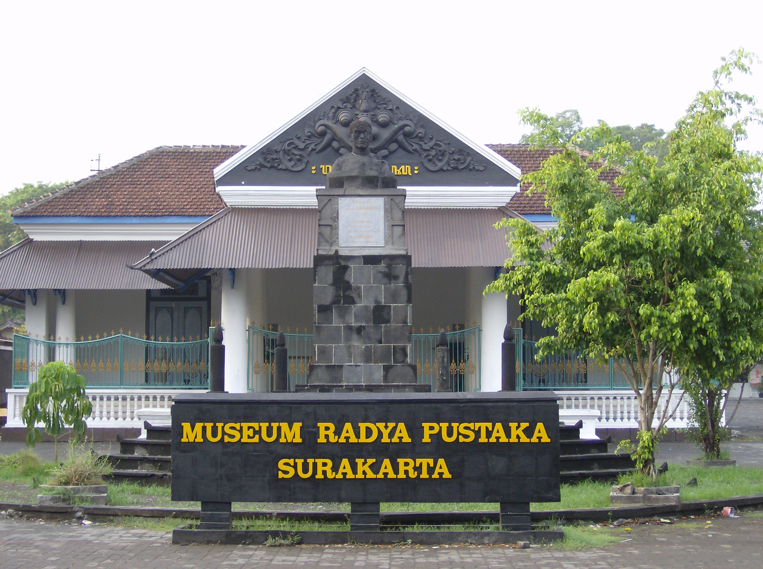 Museum Radya Pustaka Surakarta